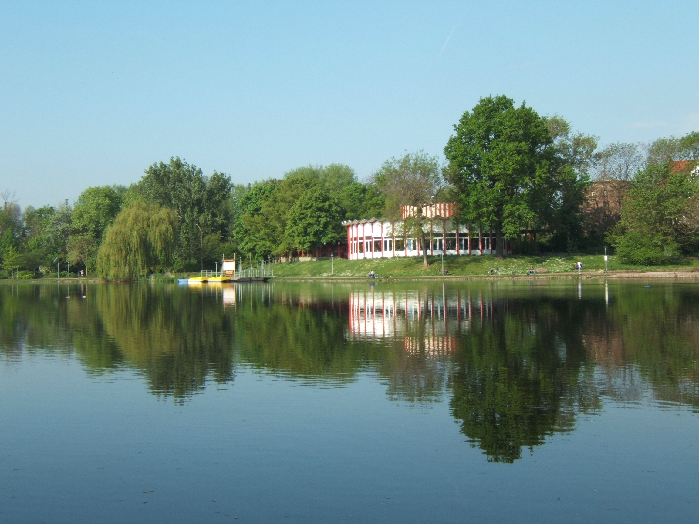 Ansicht des Planetariumsgebäudes in Merseburg